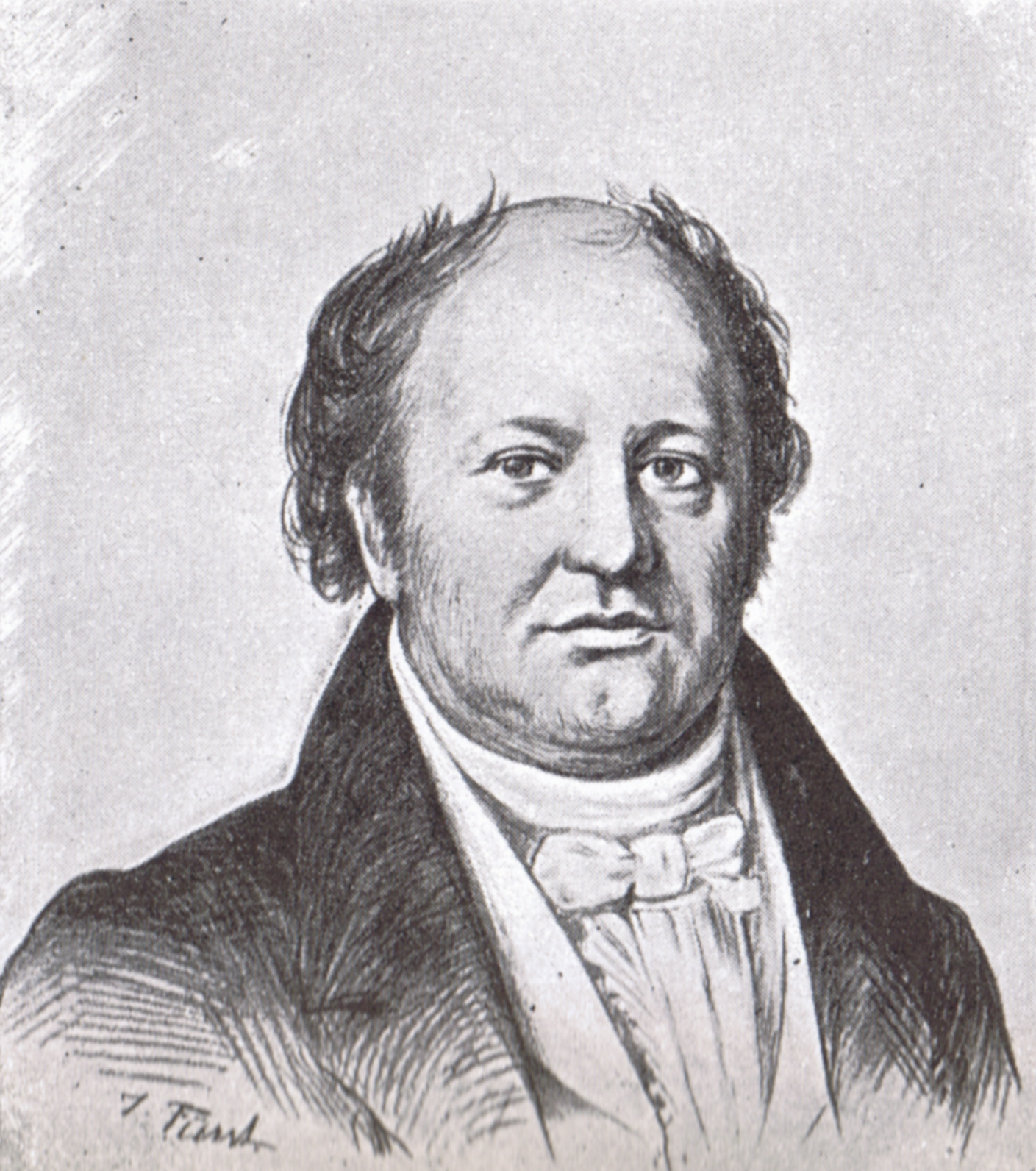 Franz Hermann Hegewisch (1783-1865), liberaler schleswig-holsteinischer Arzt, Zeichnung von Julius Fürst um 1895